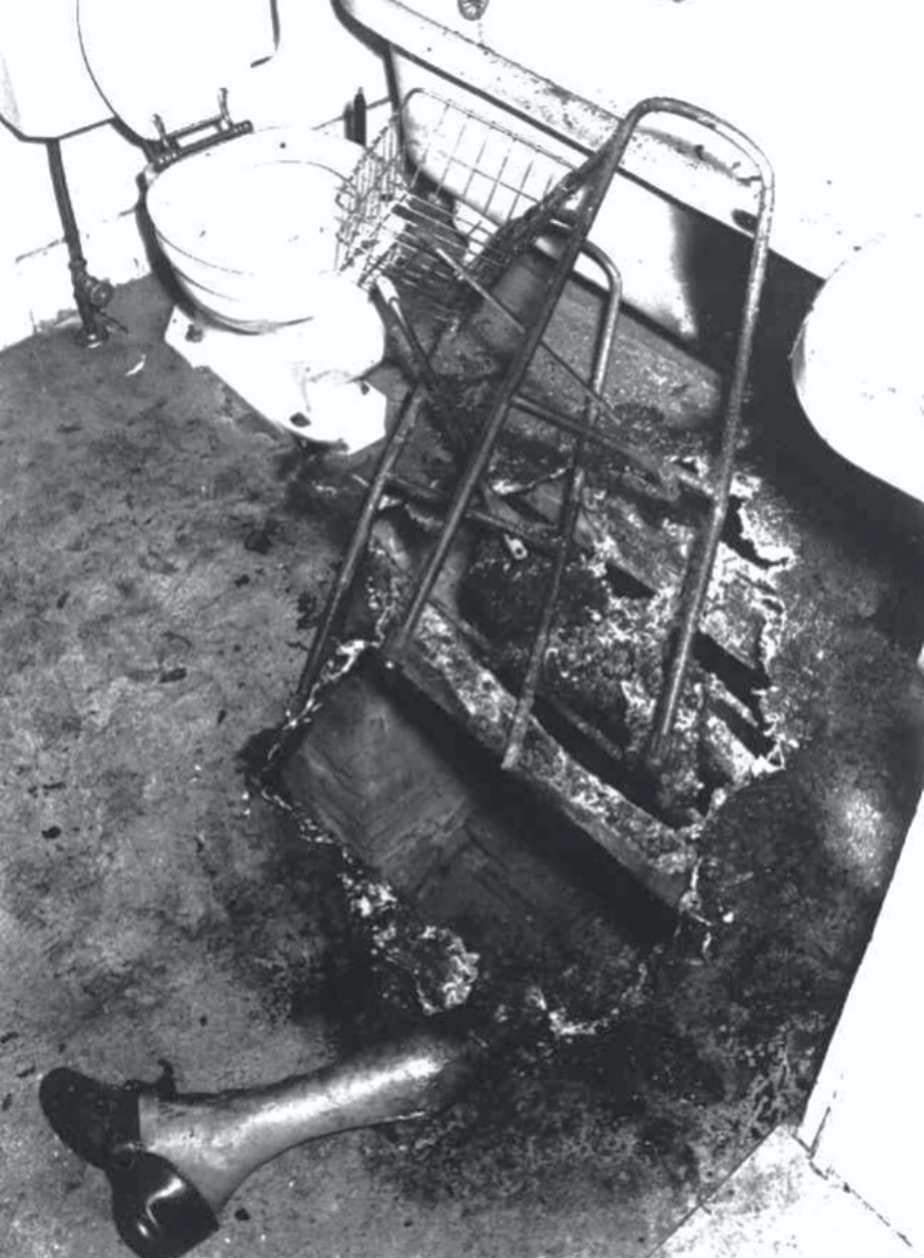 La Extraña Escena de la Muerte de John Irving Bentley (1874-1966)